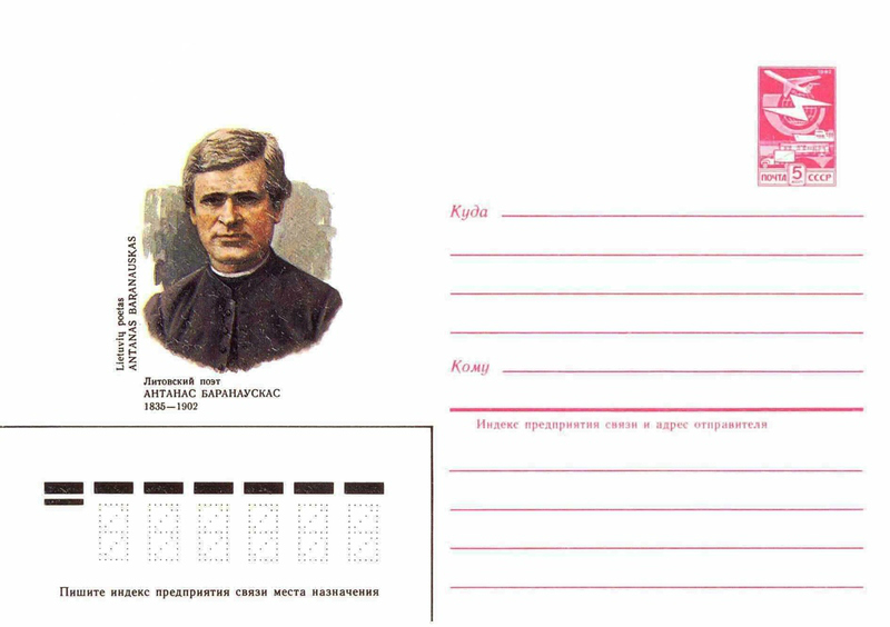 Художественные маркированные конверты 1984 года.